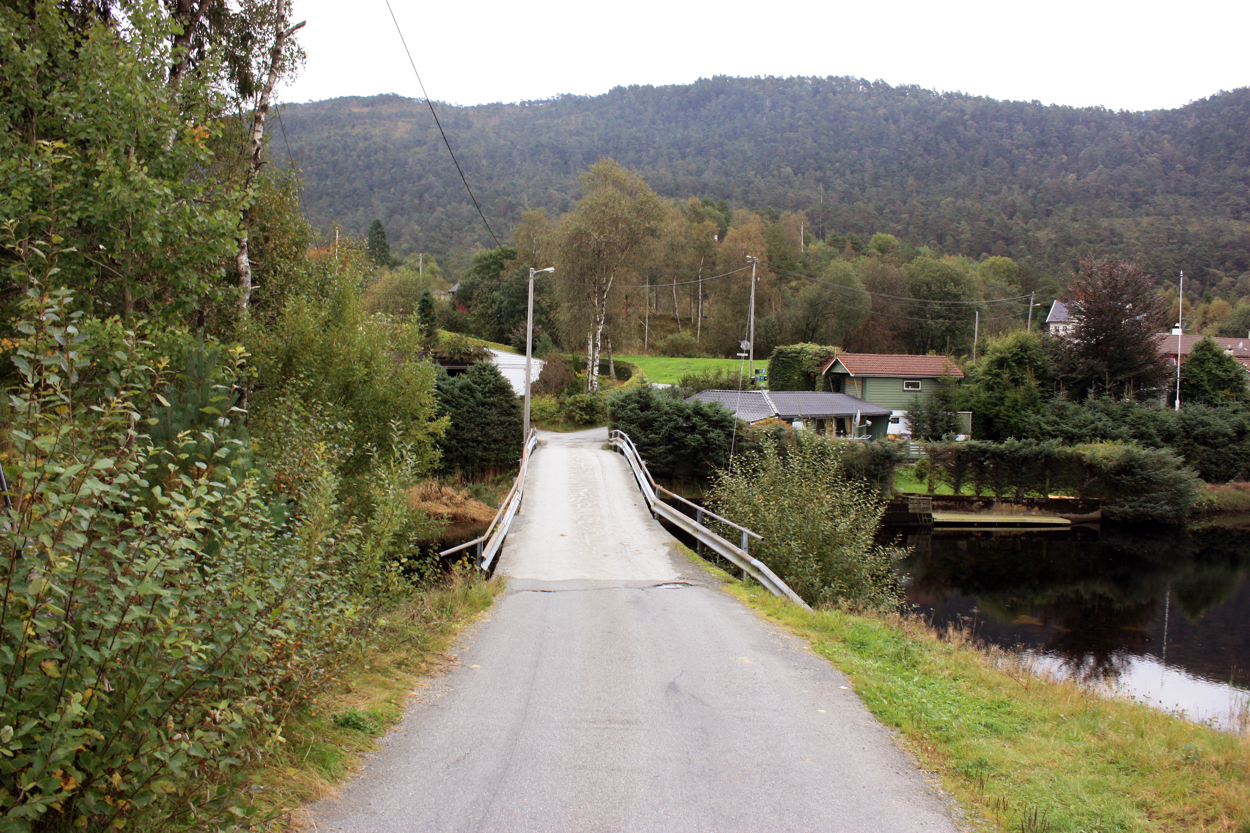 Bahusstraumen, Fana, Bergen, Norway